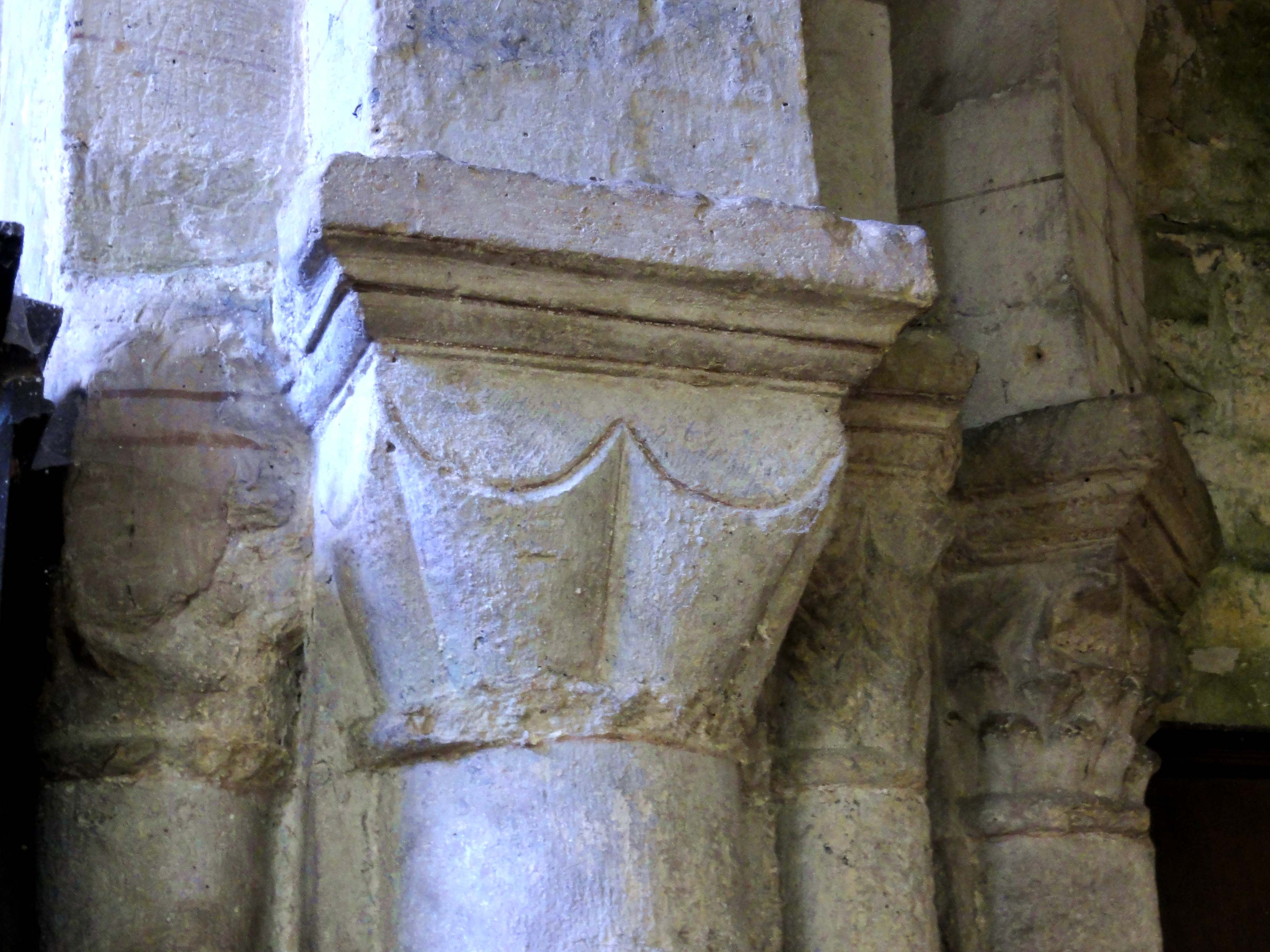 Chapiteaux romans de l'église Saint-Pierre-et-Saint-Paul (voir titre).